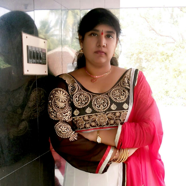 అభిలాష రచయిత్రి